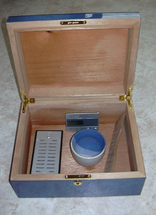 Хьюмидор. Коробка для хранения сигар.